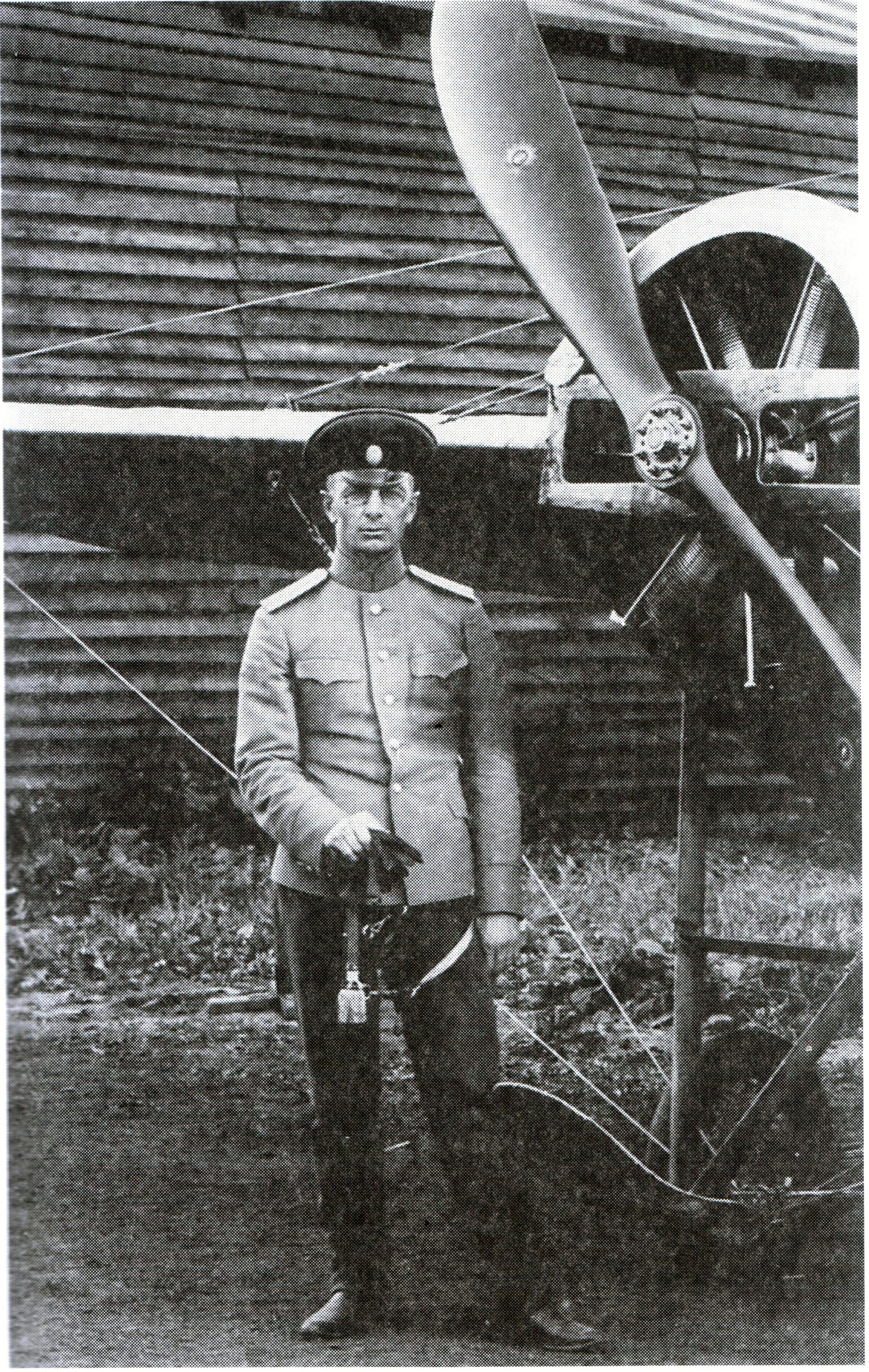 Капитан Михаил Гордеевич Дроздовский. Севастопольская авиационная школа. 1913 г.